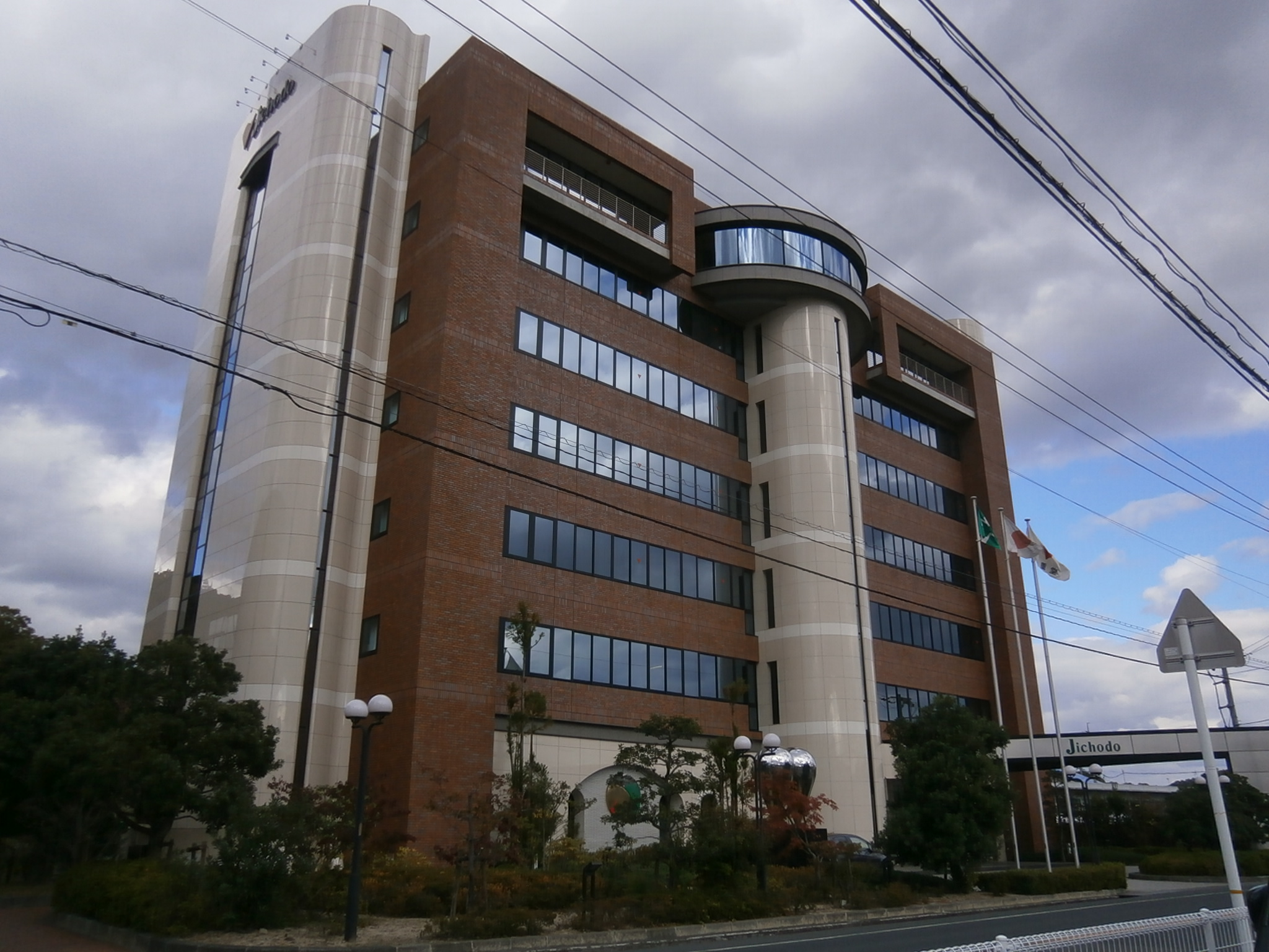 広島県福山市にある自重堂の本社ビル